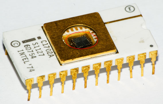 Ukázka paměti EPROM o kapacitě 256 x 8 bitů ze 70. let 20. století